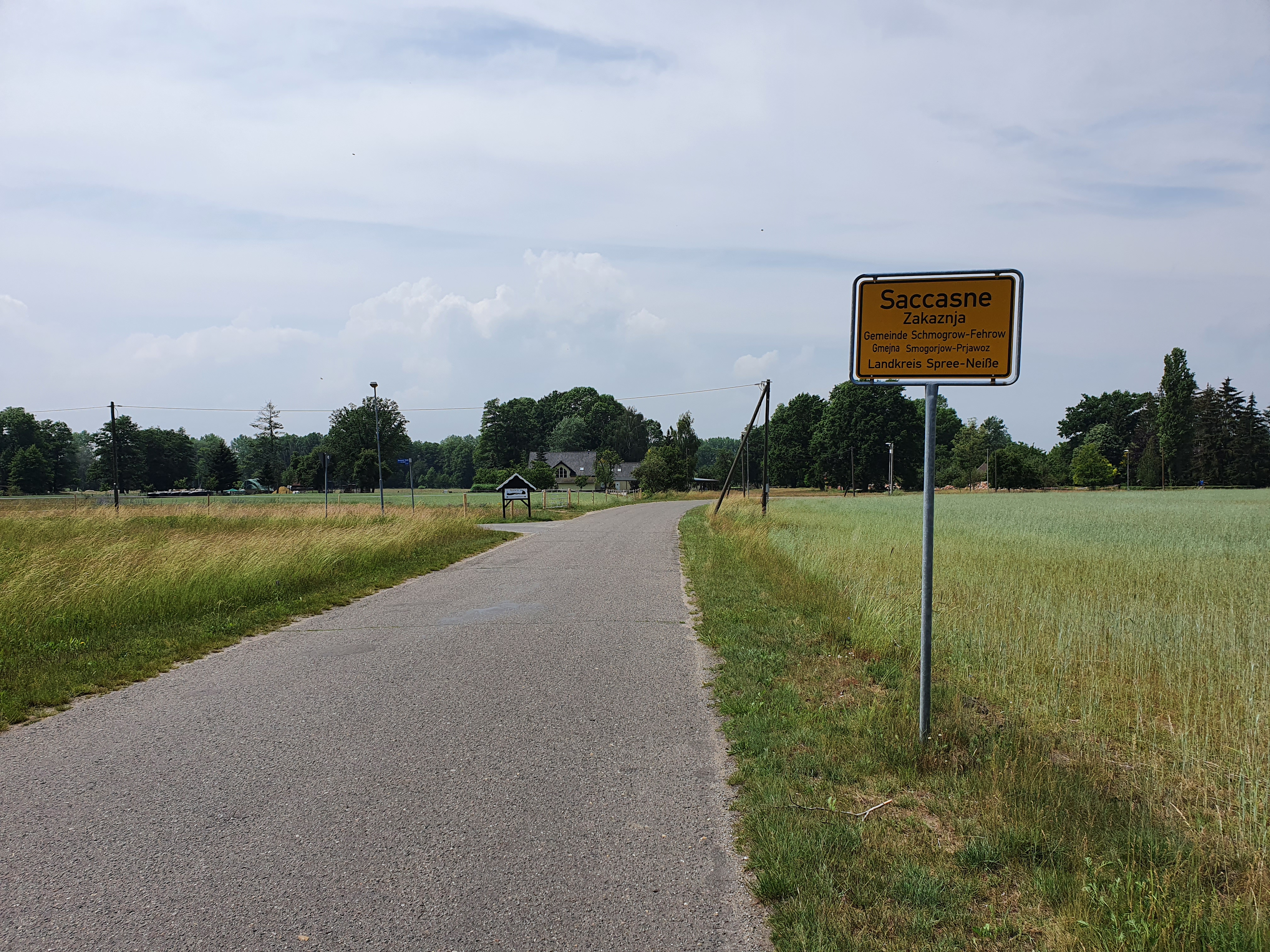 Südöstlicher Ortseingang von Saccasne, aus Richtung Schmogrow kommend.